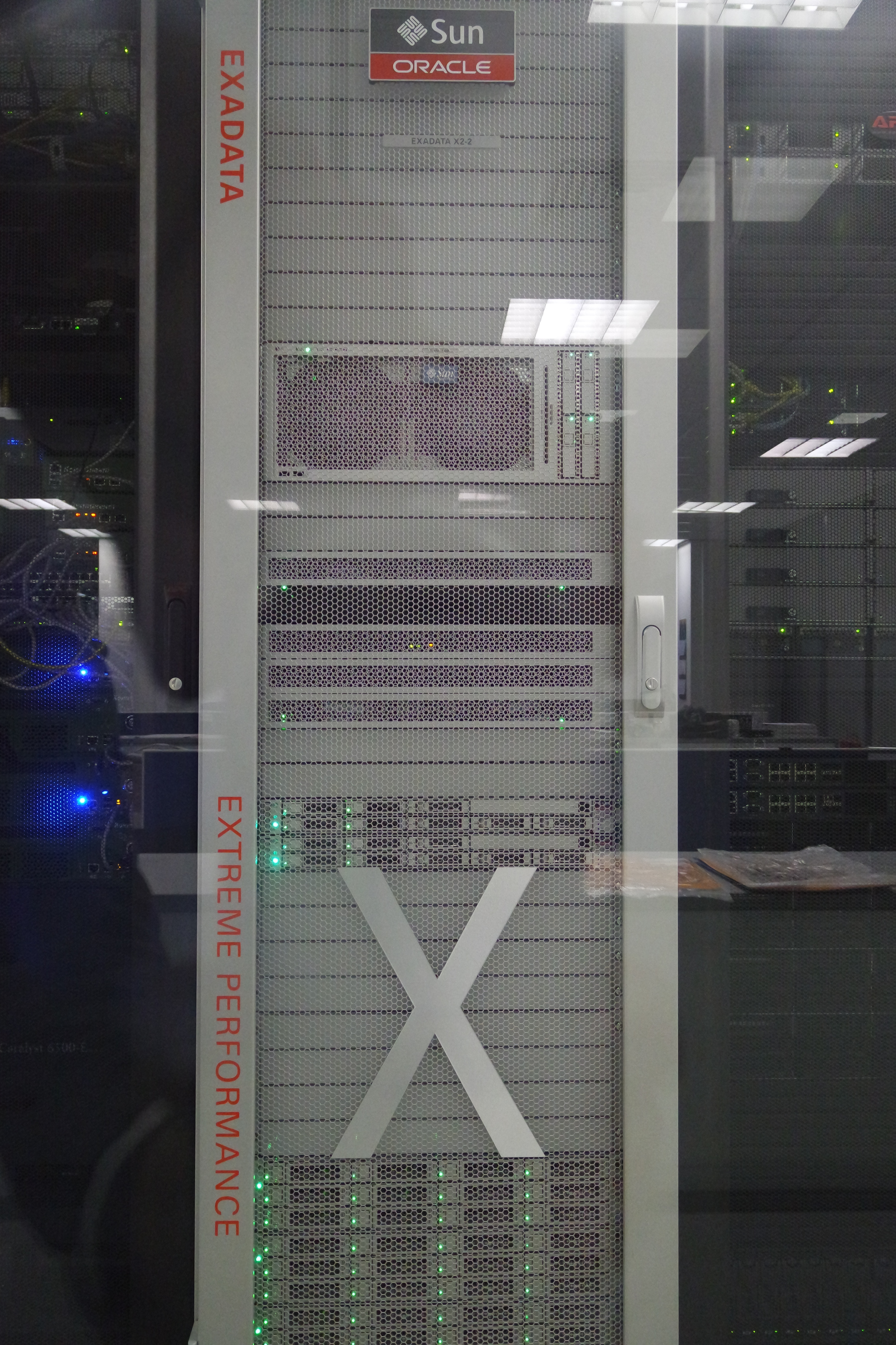 Аппаратно-прграммный комплекс Exadata X2-2 (конфигурация ¼ шкафа)